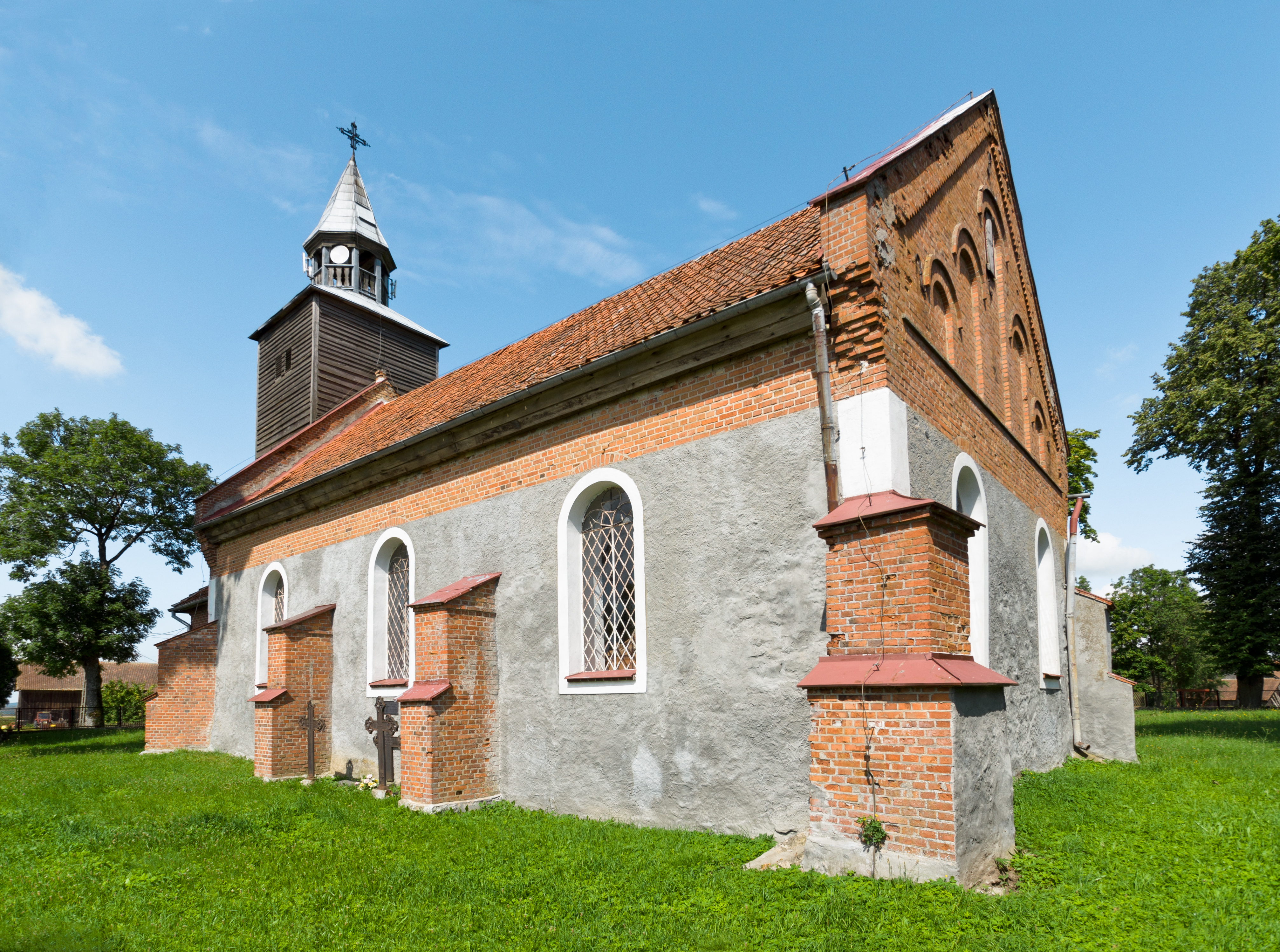 Janikowo - rzymskokatolicki kościół filialny (decyzja kaplica) p.w. Matki Boskiej Różańcowej, kon. XVI, XIX